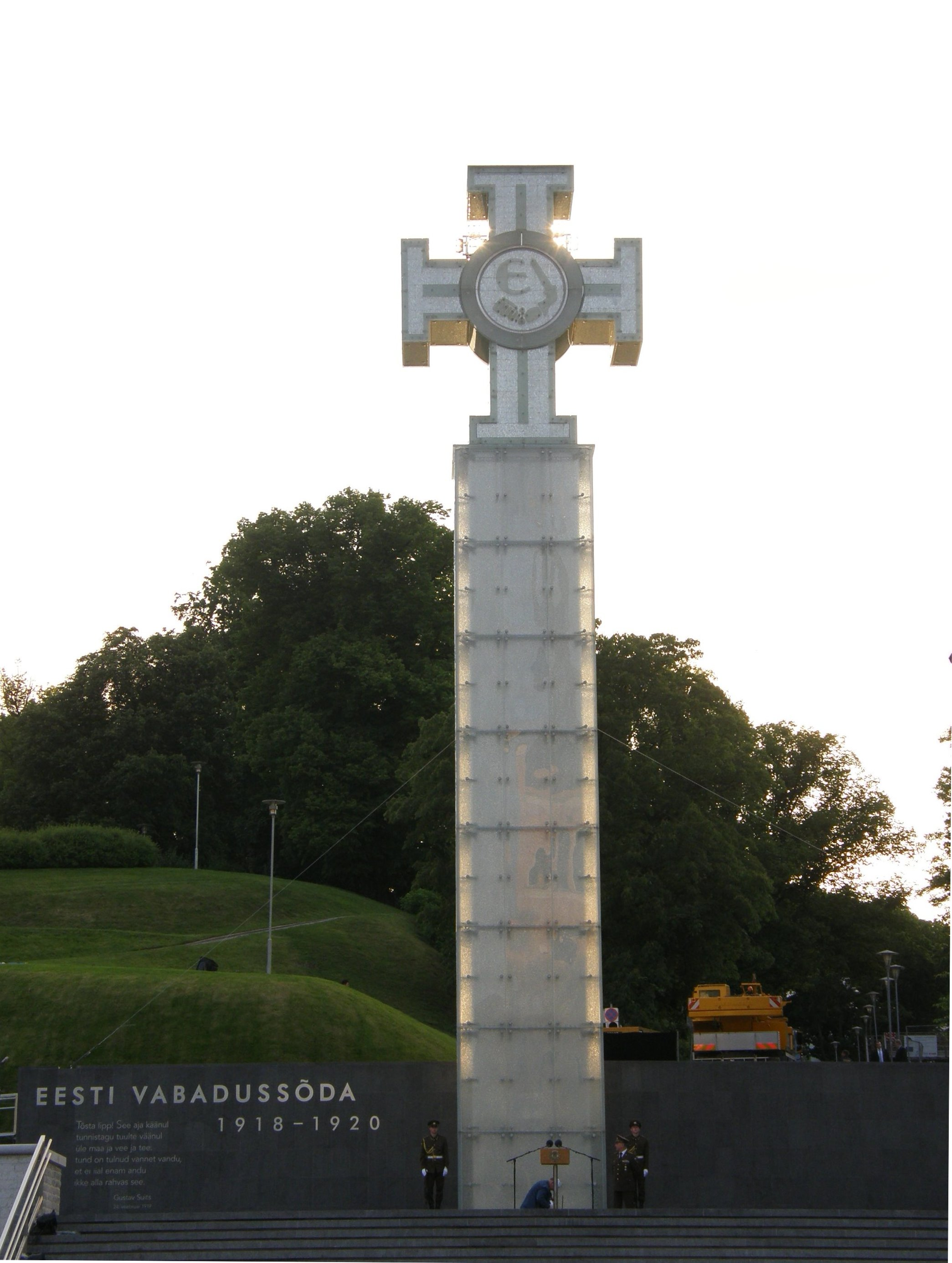 Vabadussõja võidusammas